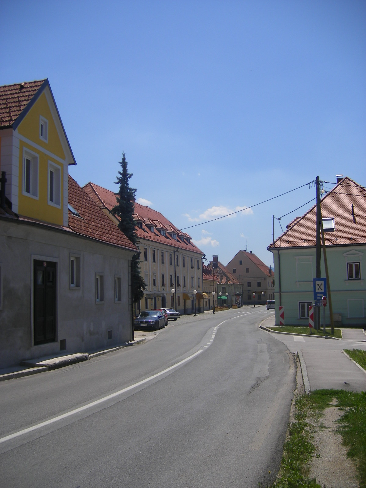 Vojnik - main street